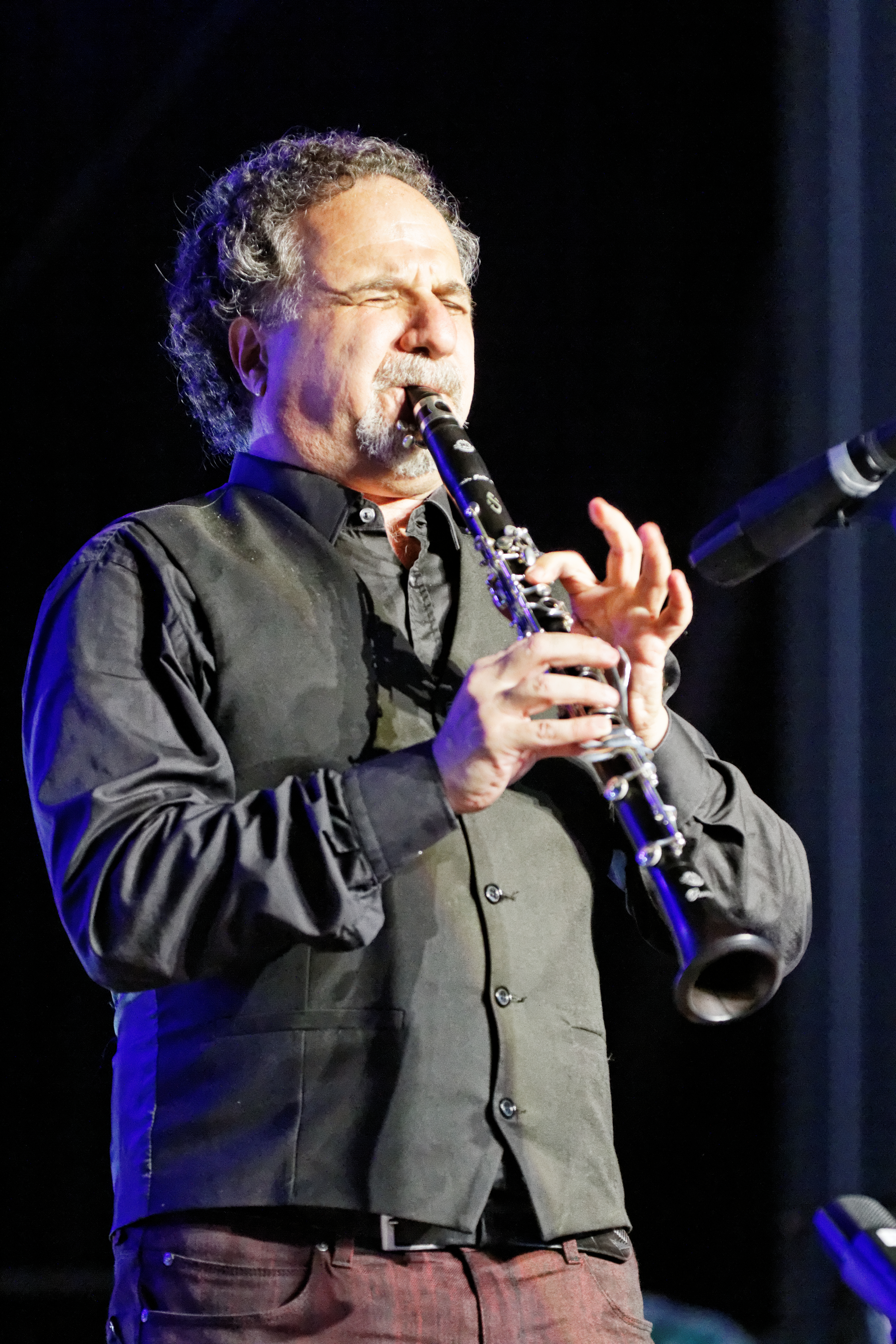 David Krakauer en concert à l'espace Per Jakez Hélias lors du festival de Cornouaille 2014.